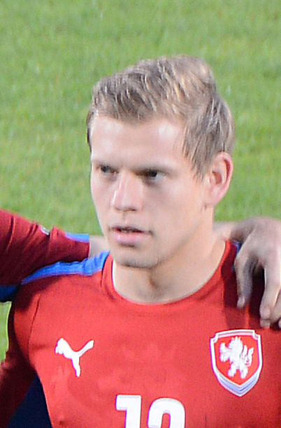 Mezinárodní fotbalový zápas Česko - Rakousko v Olomouce